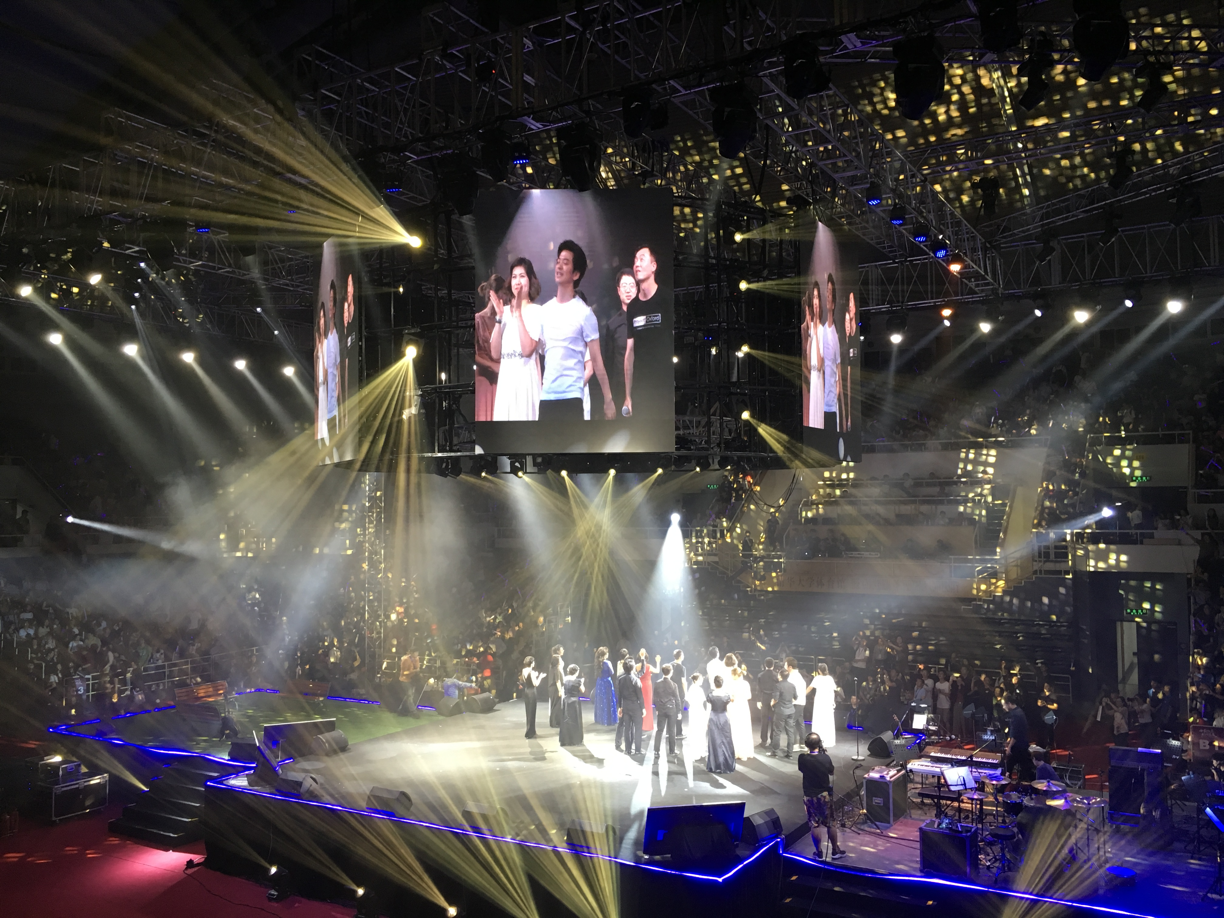 李健在清華大學校慶時開演唱會